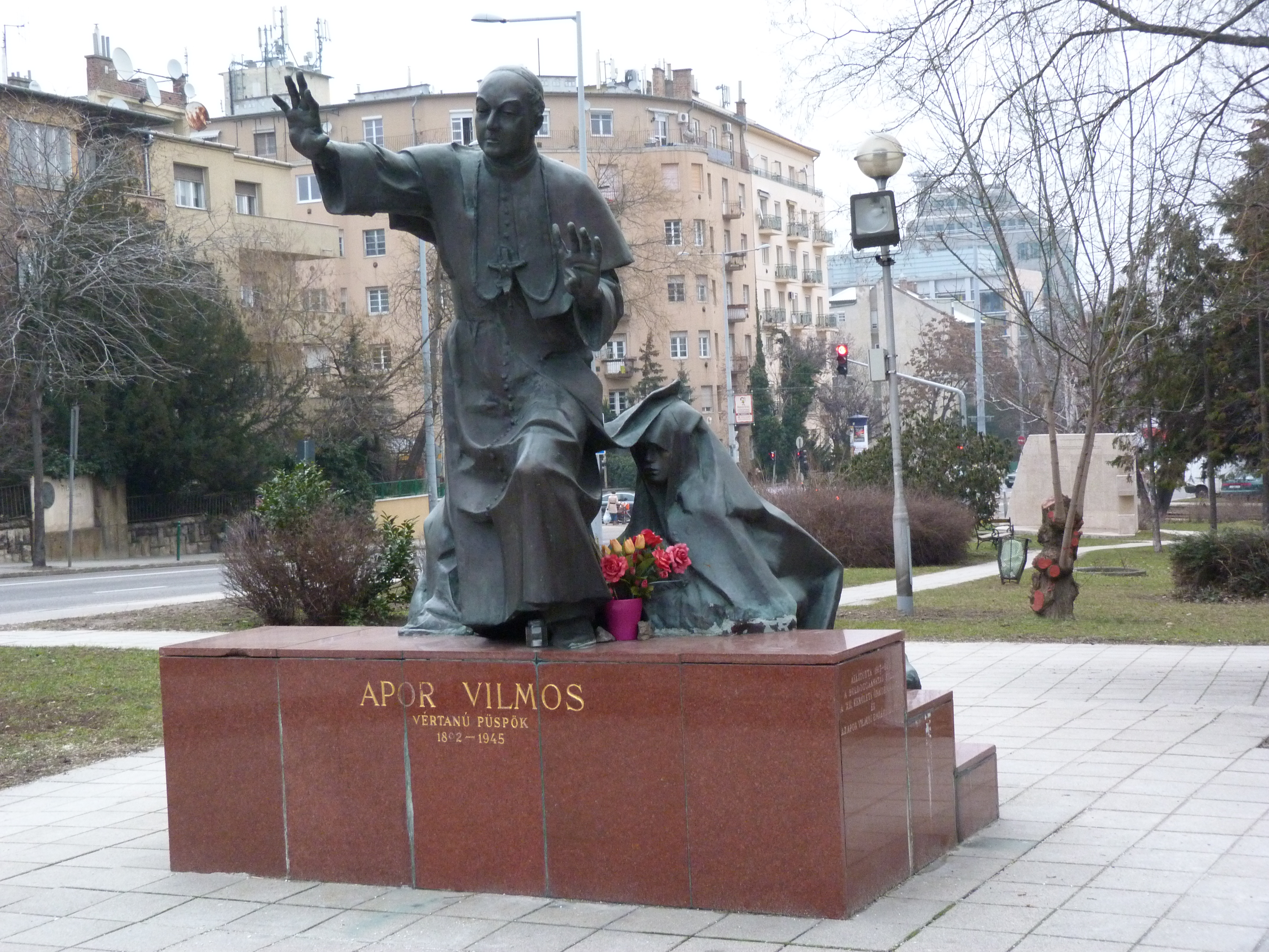 Statue de Vilmos Apor (sculptor László Marton), place Vilmos Apor, Budapest.